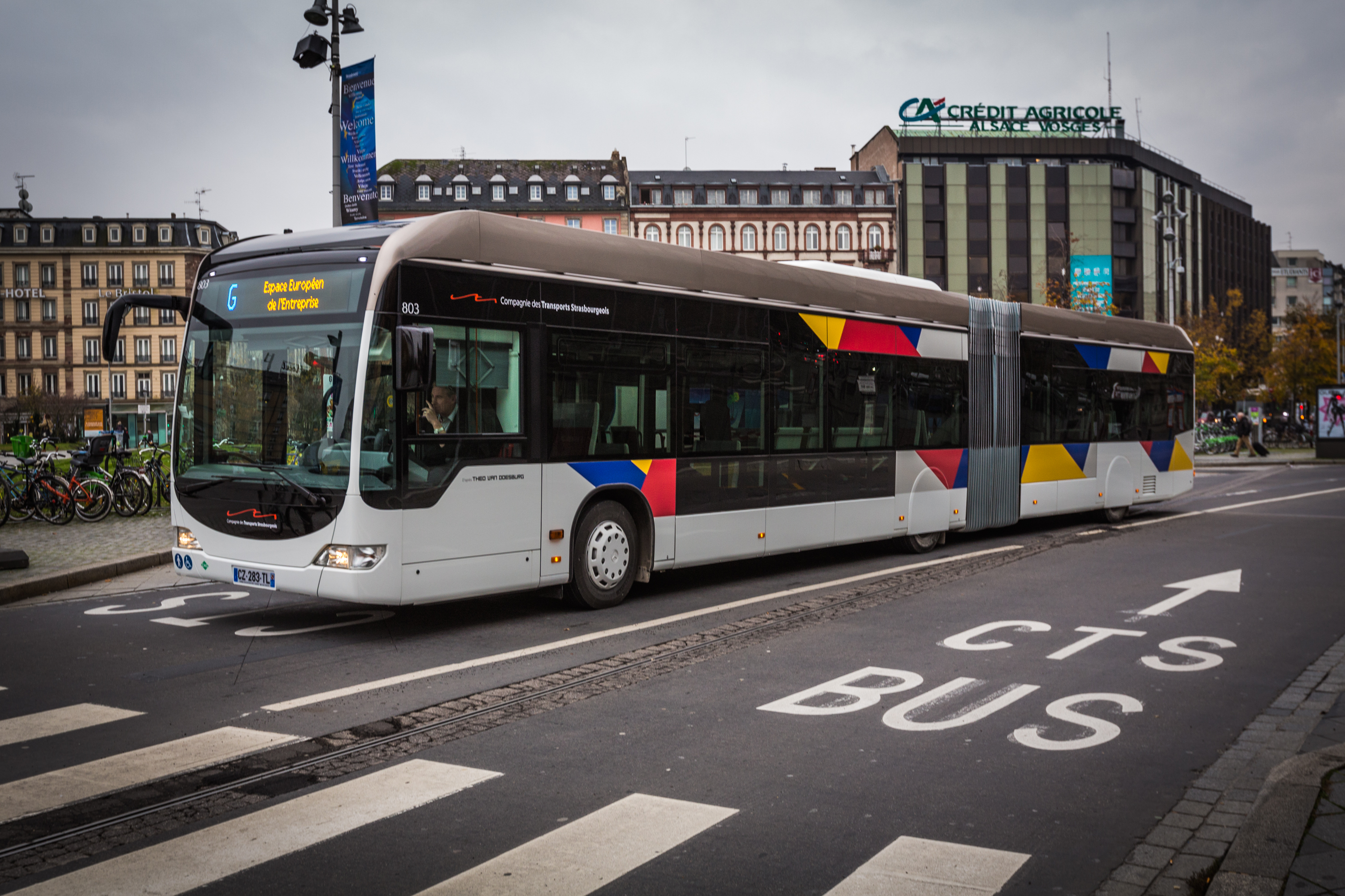 BHNS ligne G phase d'essai et de formation. Strasbourg 14 novembre 2013.